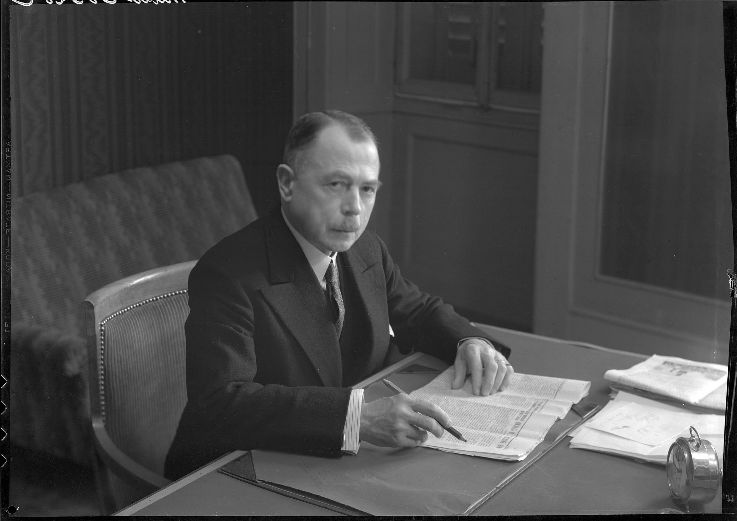 Négatif argentique noir/blanc de Théodore Aubert, collection de la bibliothèque de Genève.